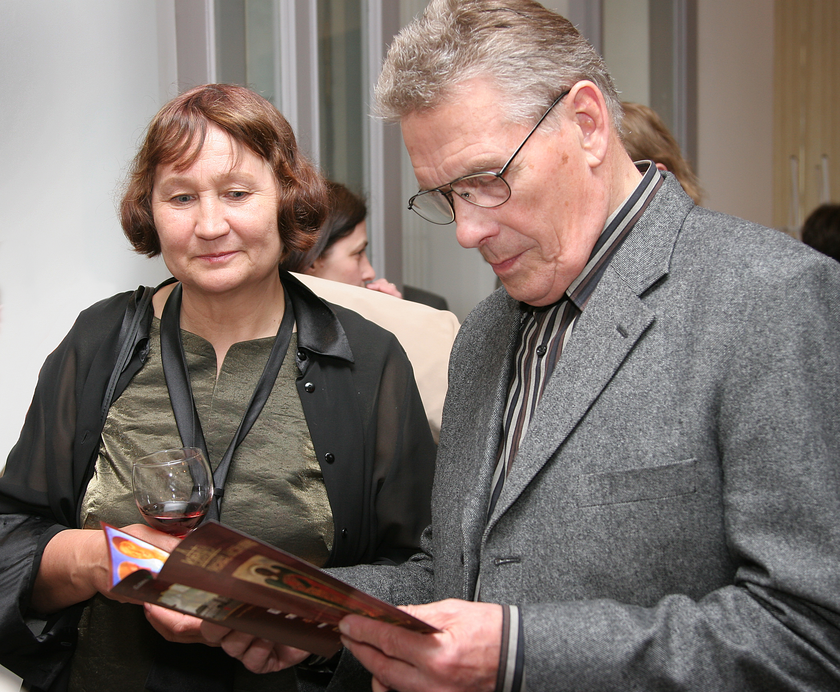 Maalikunstnikud Aili Vint ja Olev Subbi 2006